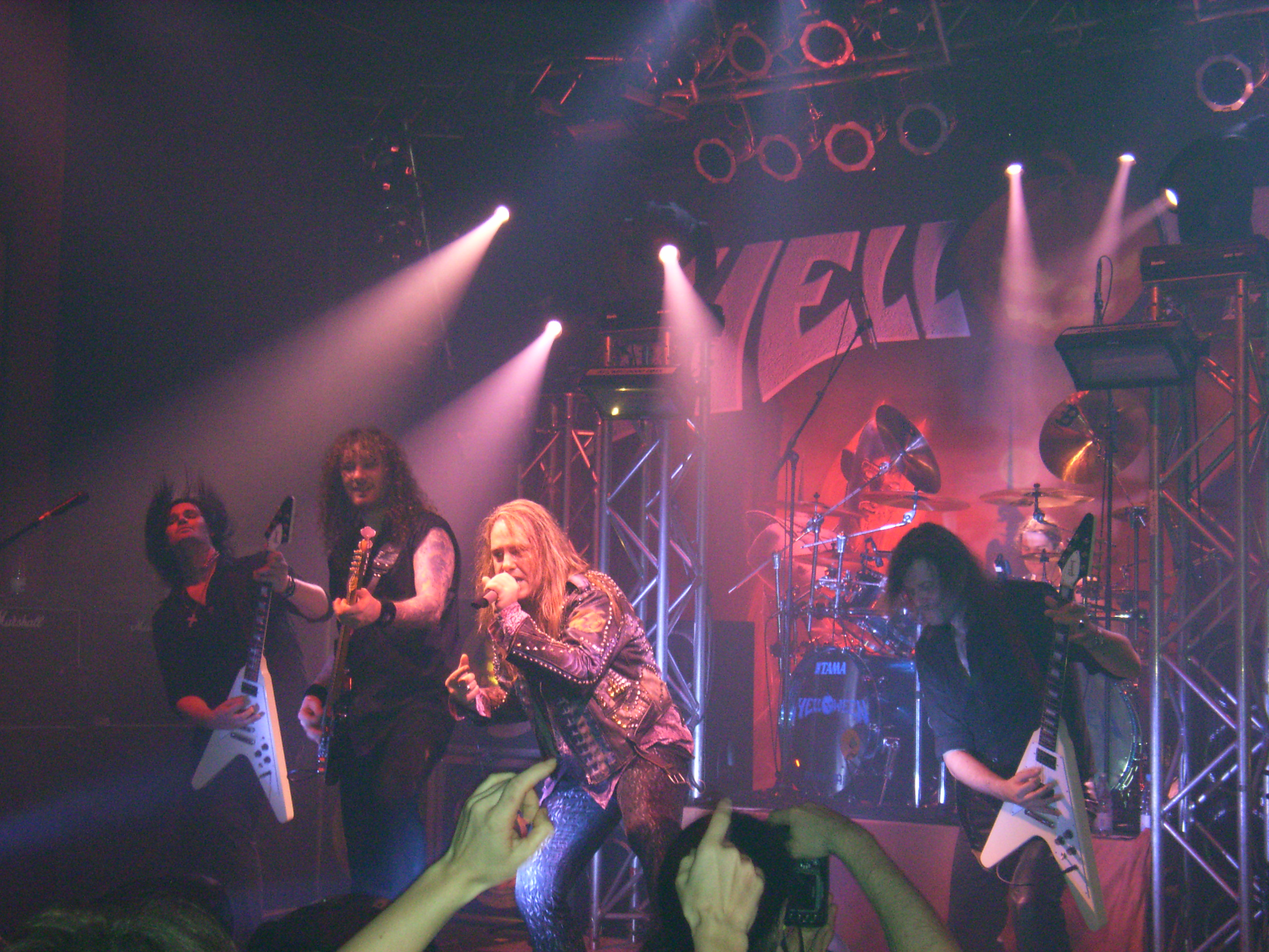 Helloween Live at Löwensaal in Nuremberg 18.01.2006